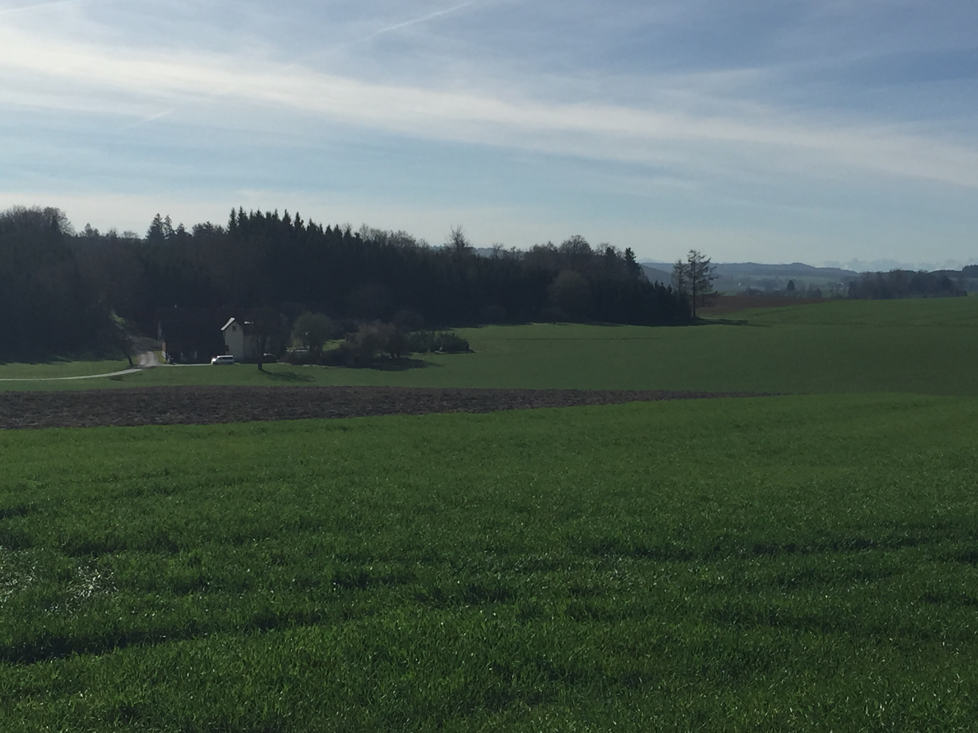 Der Weiler Bethlehem, Ortsteil Gaisweiler, Stadt Pfullendorf